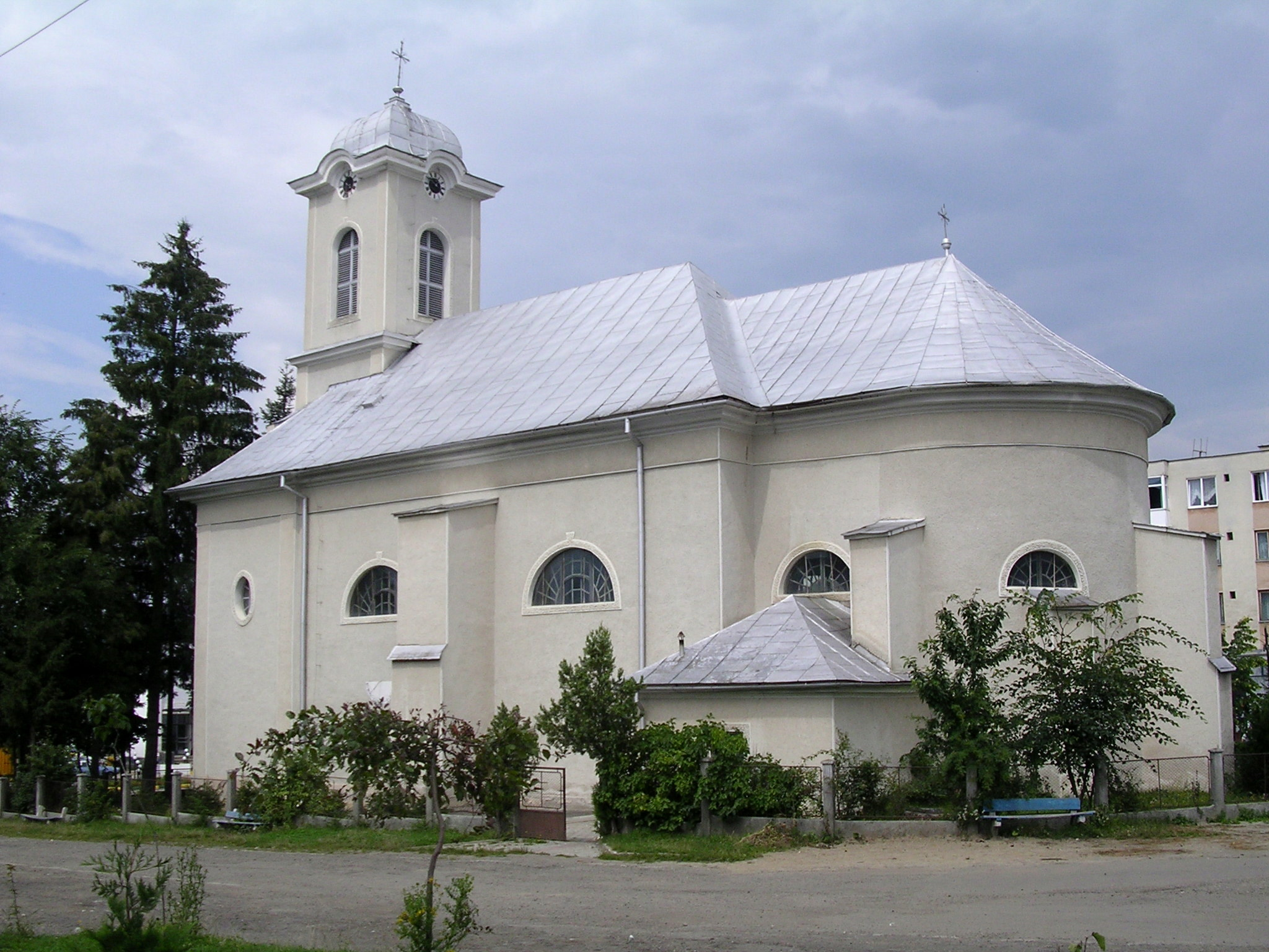 Katolikus templom Aknasugatagon